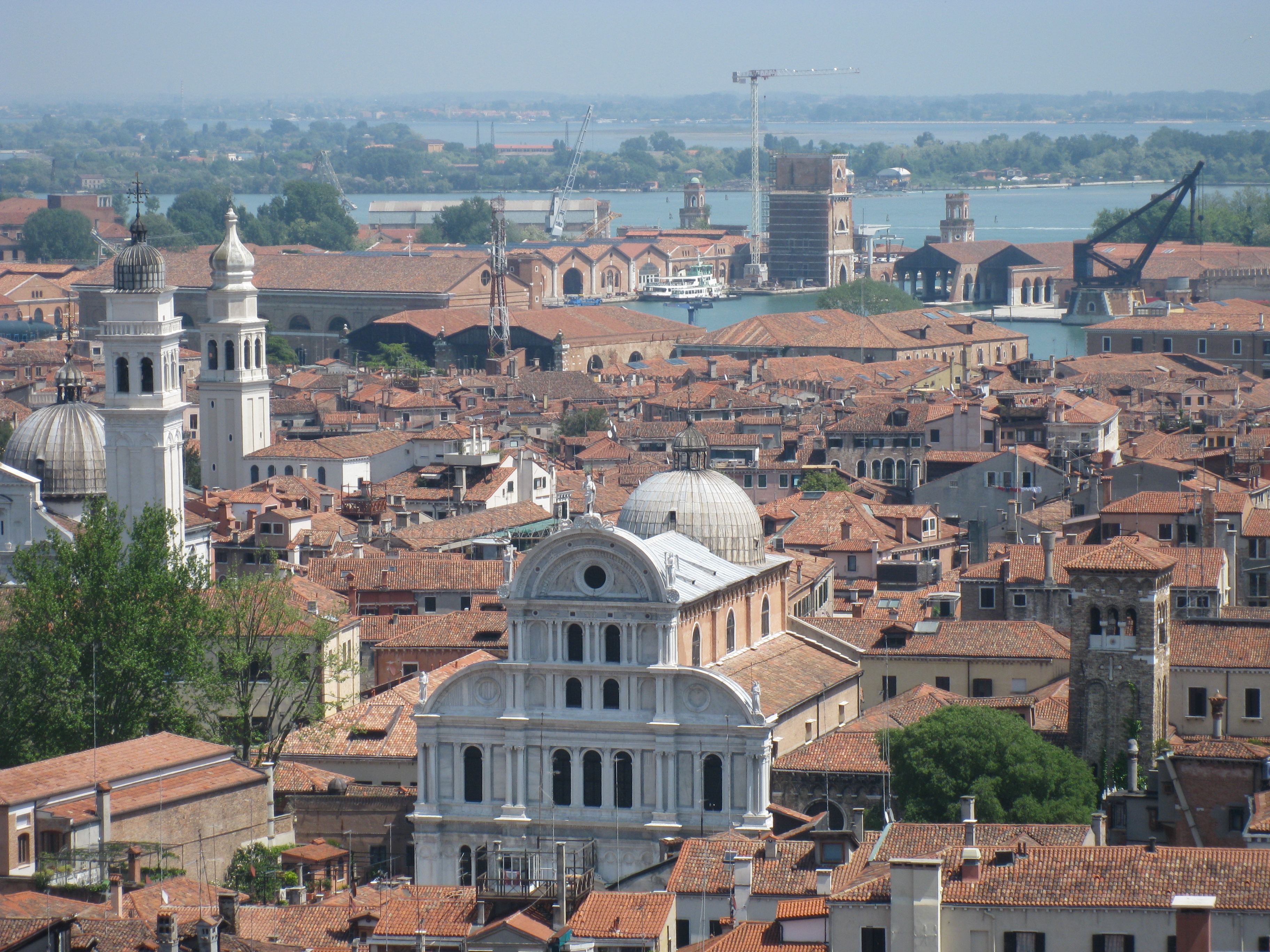 San Zaccaria Church כנסיית סן זכריה